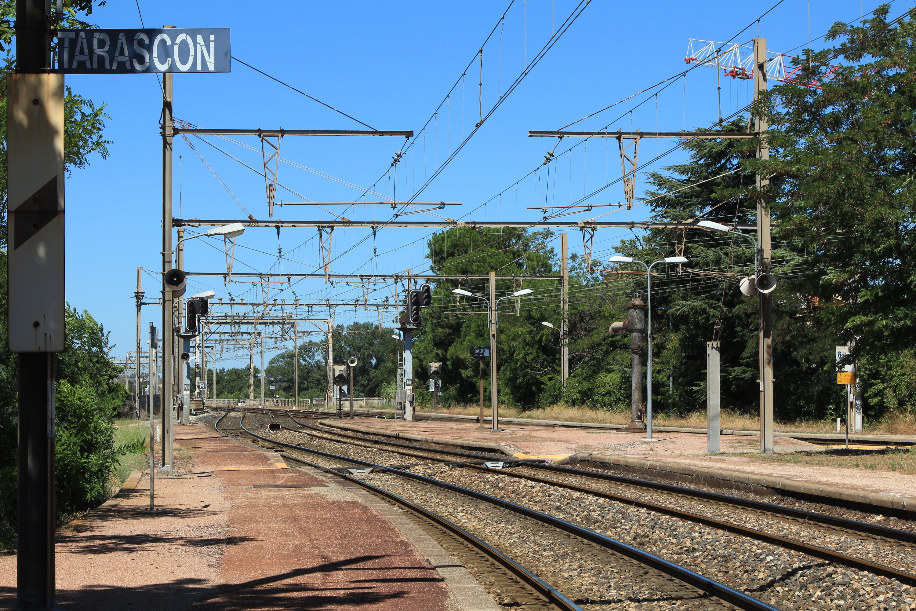 Quai de la gare de Tarascon en direction de Nîmes.